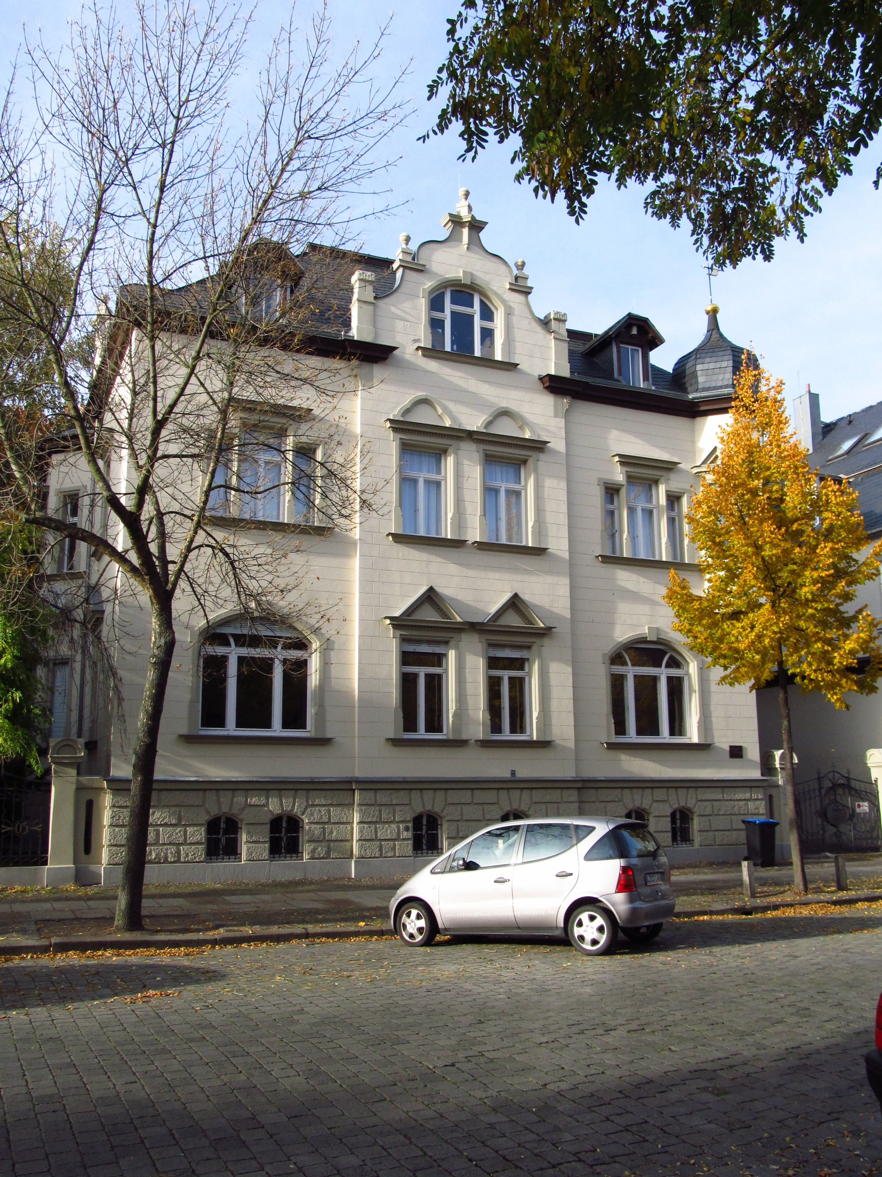 Foto der Villa Tübke